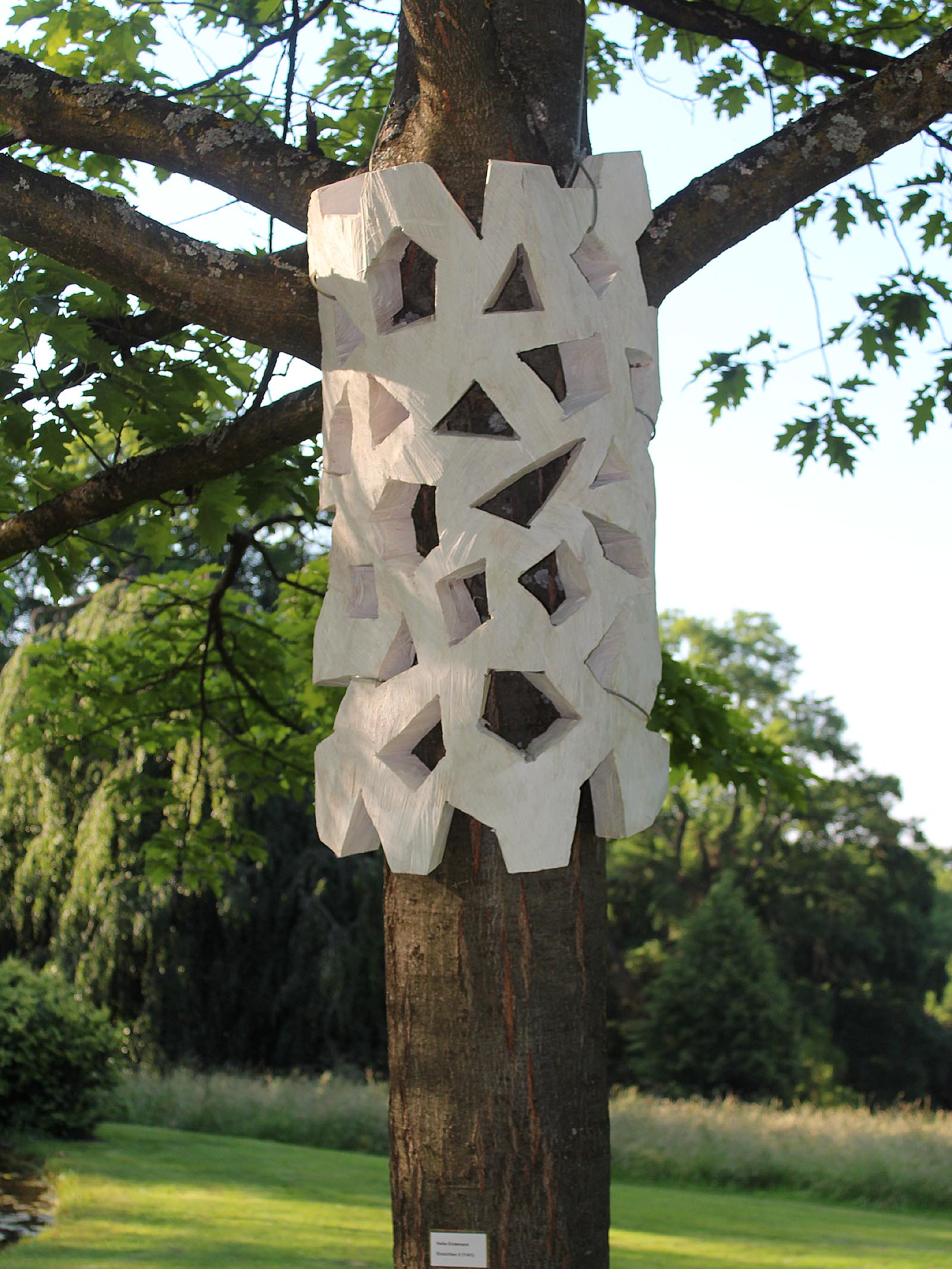 Heike Endemann, Einsicht Nr. 49, 2013, Baden-Württemberg, Schlosspark Hemmingen